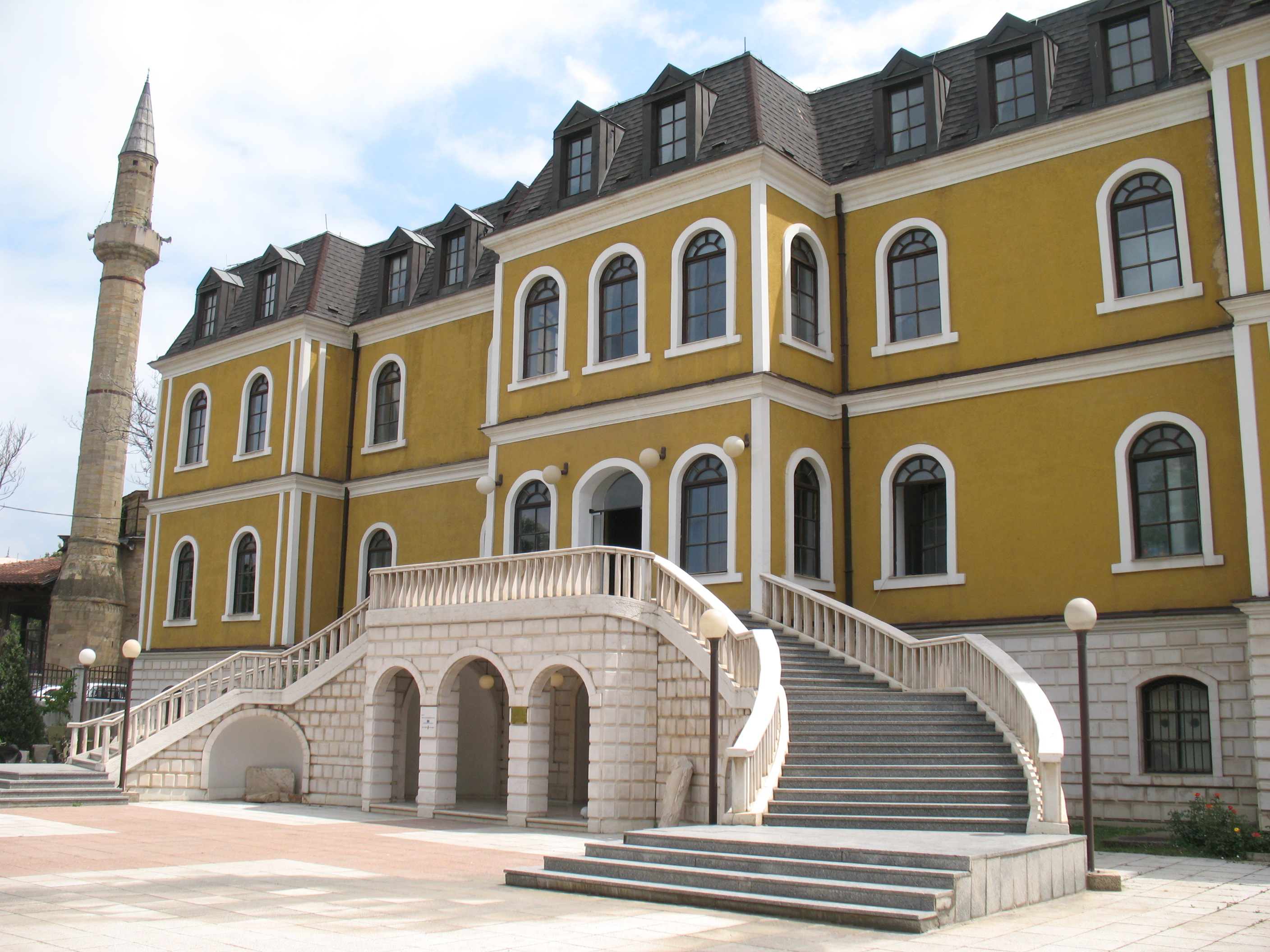 Een kleine collectie pre-historische objecten gevonden in Kosovo. Het grootste gedeelte van de collectie is vlak voor het uitbreken van de Kosovo oorlog naar Belgrado gebracht, maar is nog niet terug gebracht naar Pristina.